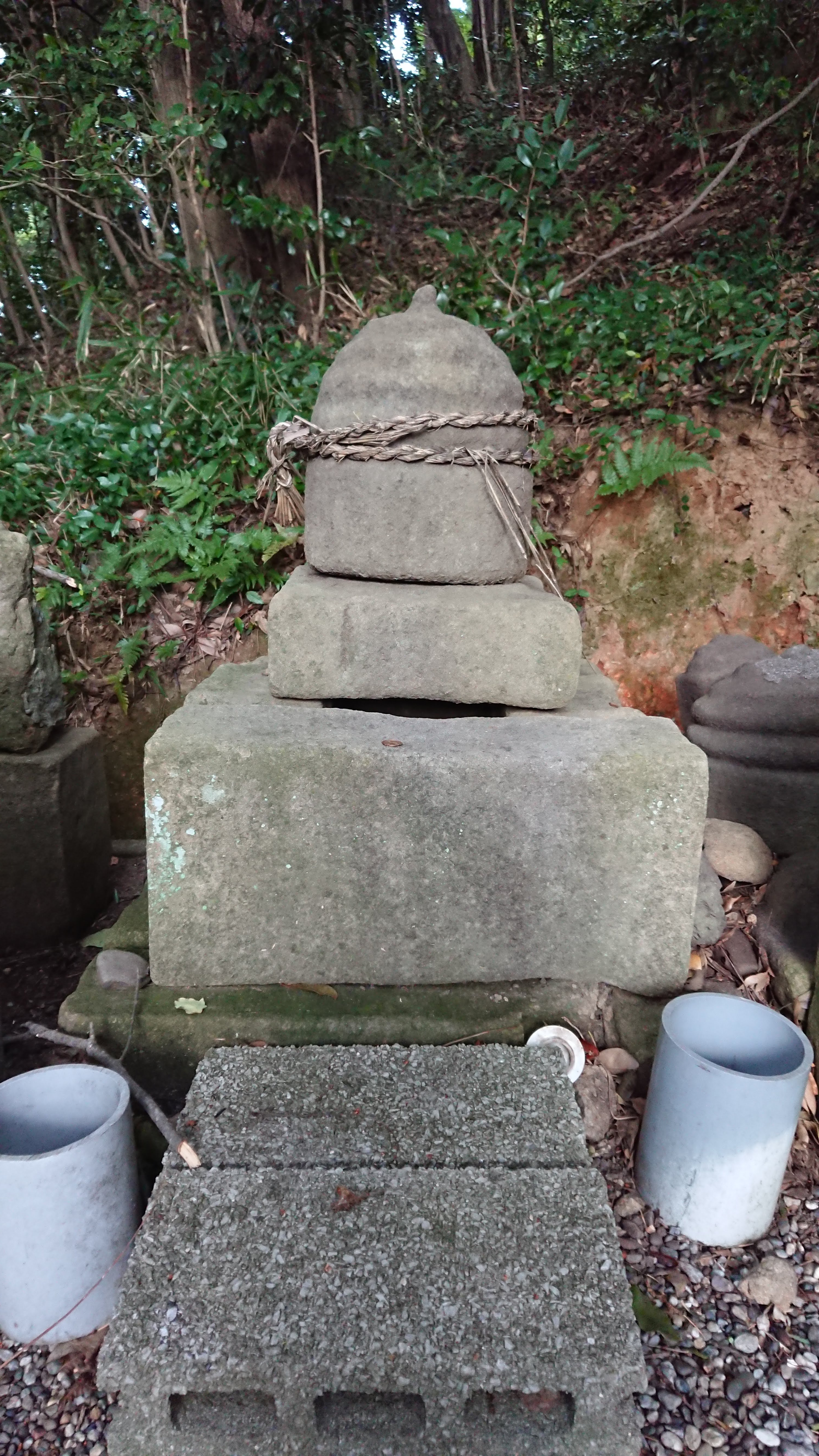 柳生宗章のものと伝わる墓